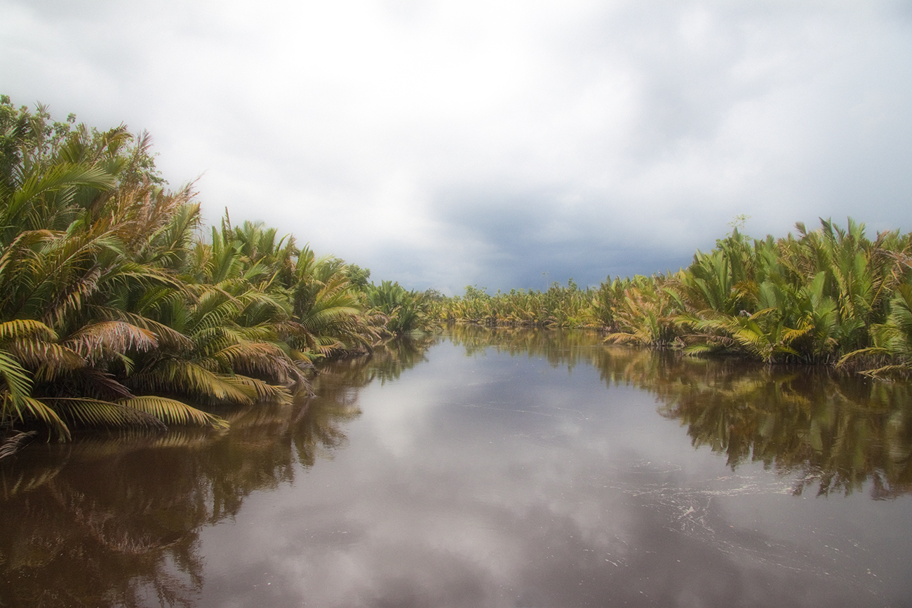 Cruising at Tanjung Puting National Park